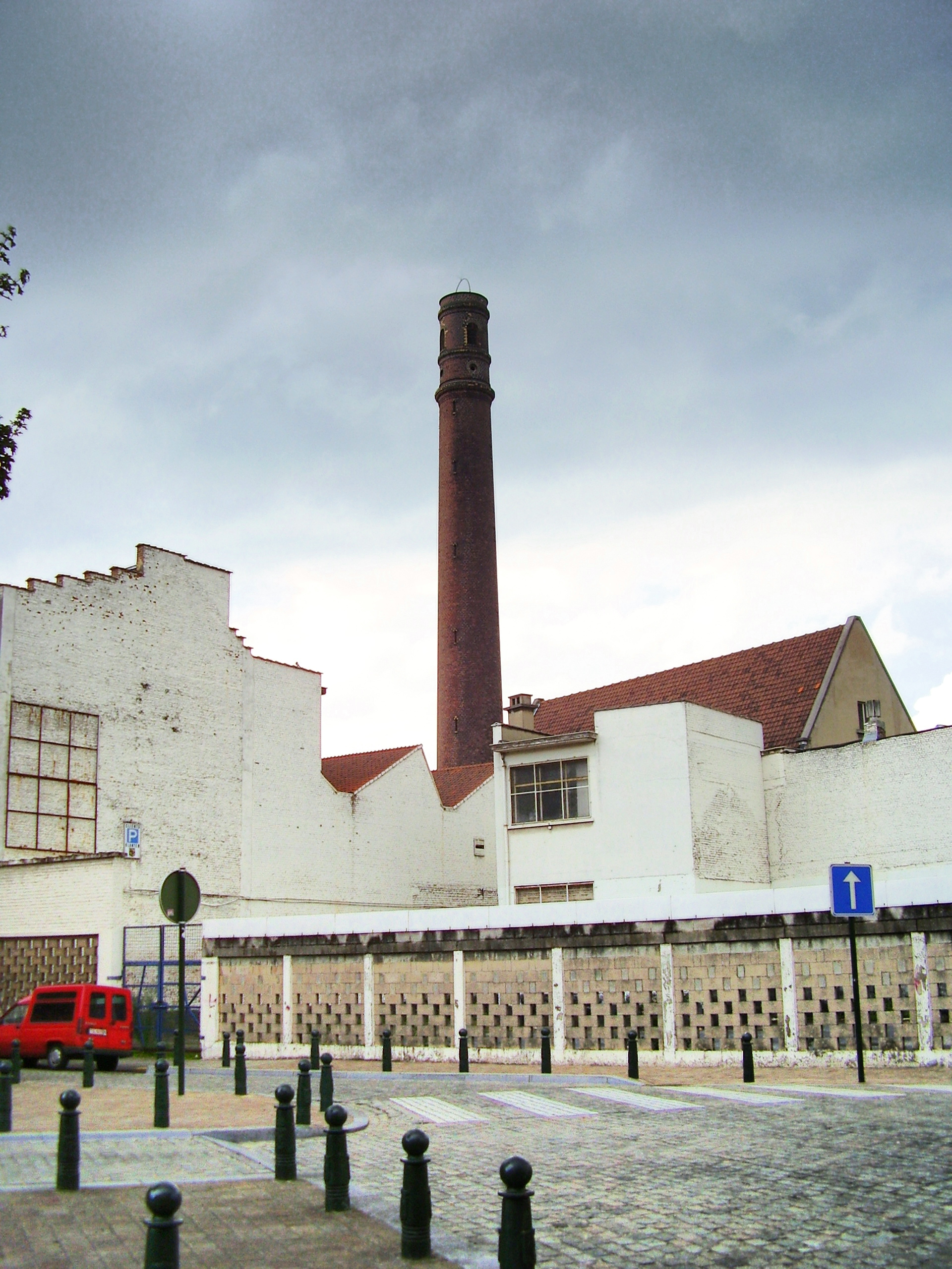 Description: Tour à plomb, utilisée pour calibrer les ploms de chasse, quartier de la Senne, Bruxelles Author: User:Ben2 Date of creation: 18 août 2006 Source: Photo personnelle